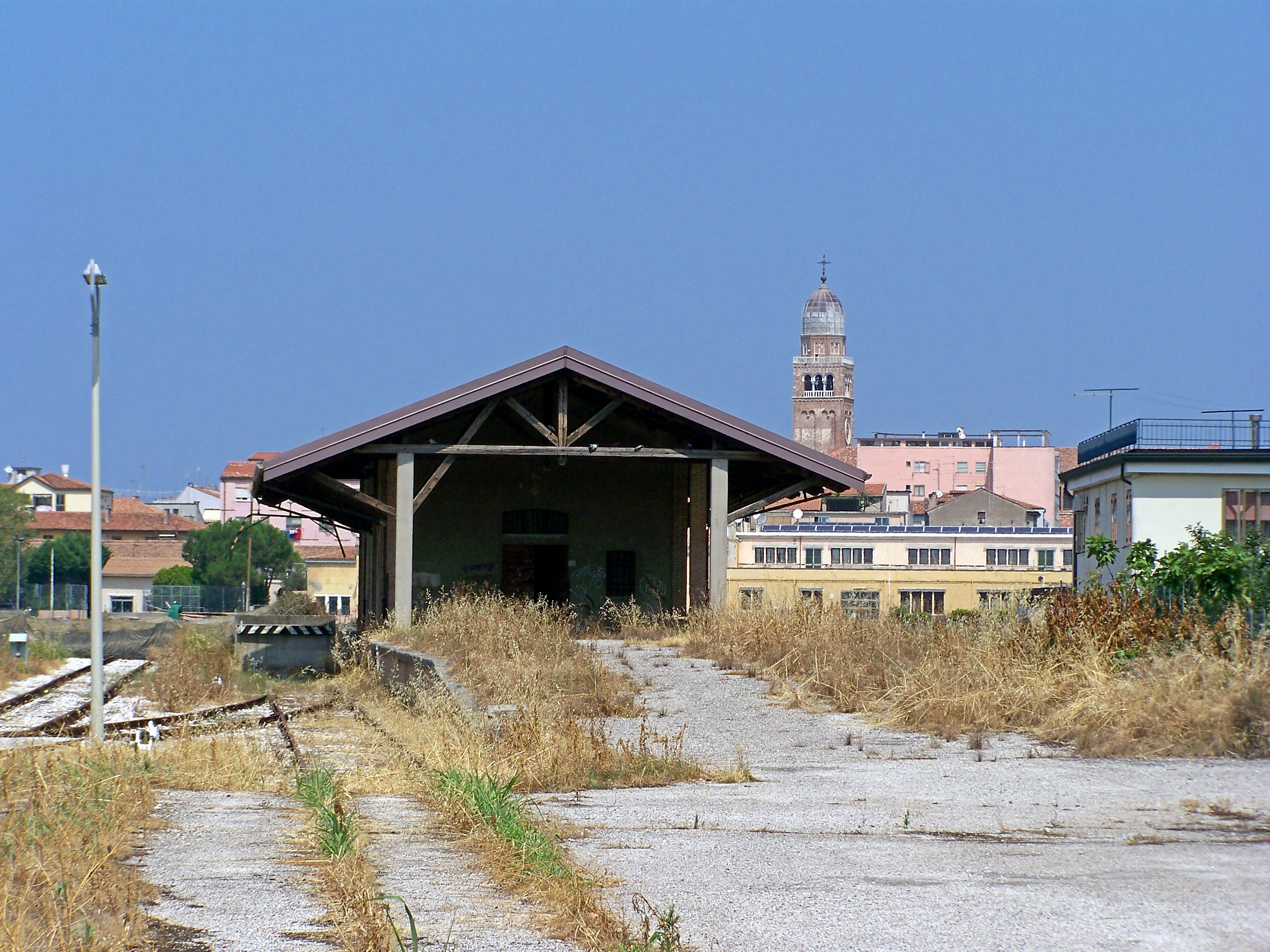 Il lato meridionale del magazzino merci con la tettoia in legno